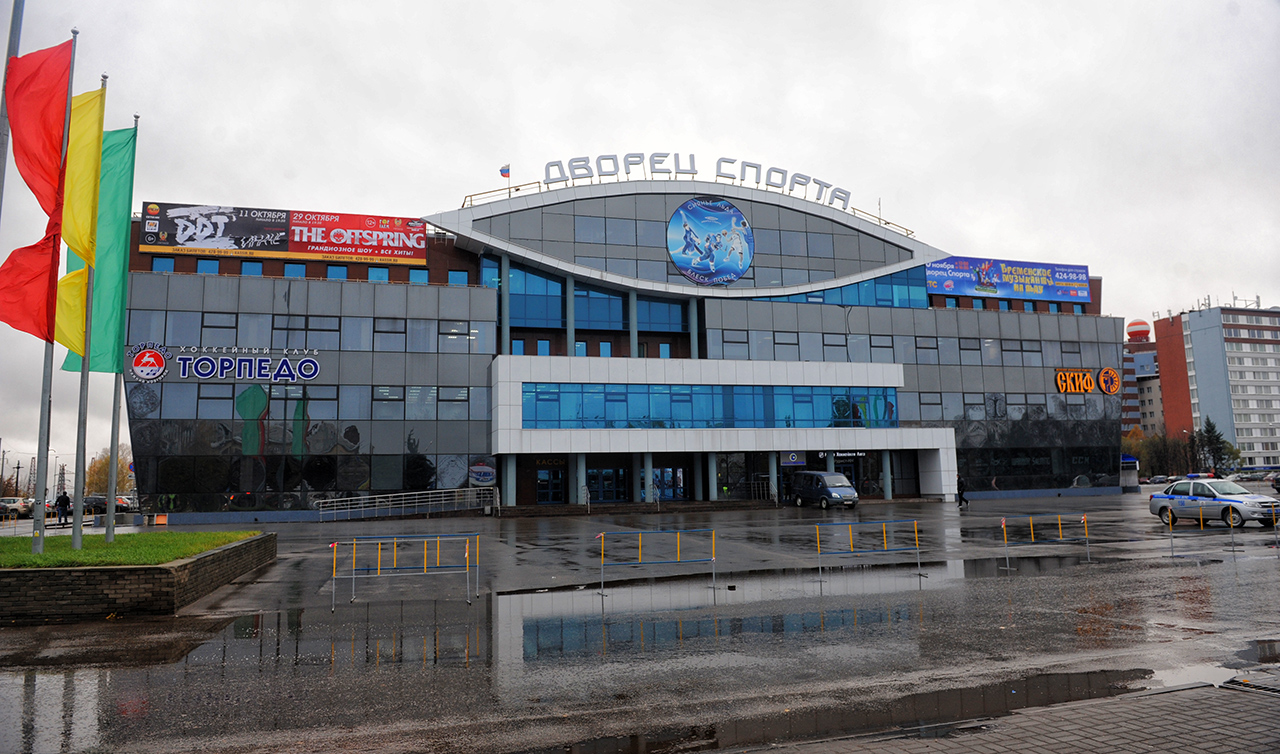 Нагорный дворец спорта профсоюзов